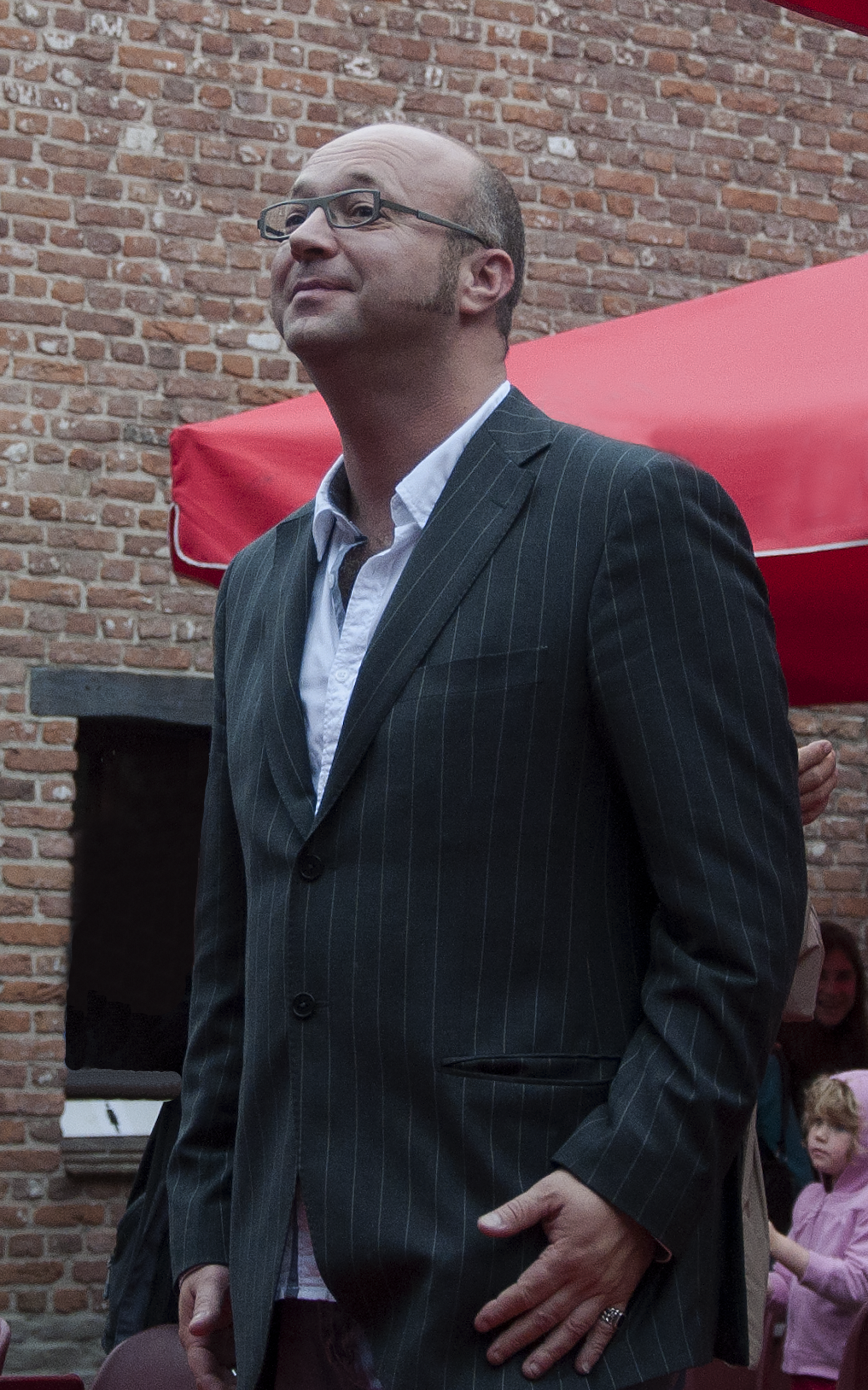 Bart Van den Bossche tijdens de Gentse feesten 2011, België